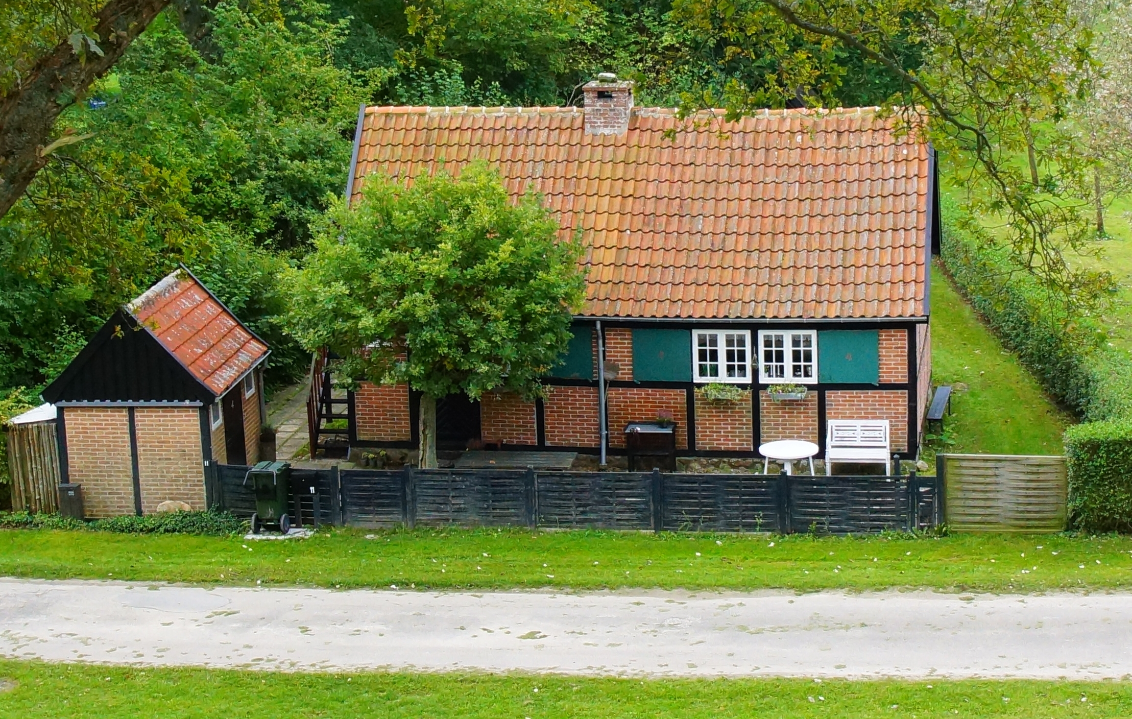 Egil Fischer arkitektur, Femmøller 1